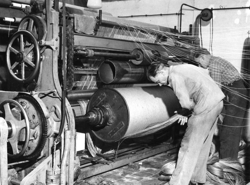 2.11.1953 Vereinigte Jute-Spinnereien und Webereien A.G., Hamburg, Werk Beuel Schlichtmaschine: Fertigmachen eines Kettbaumes